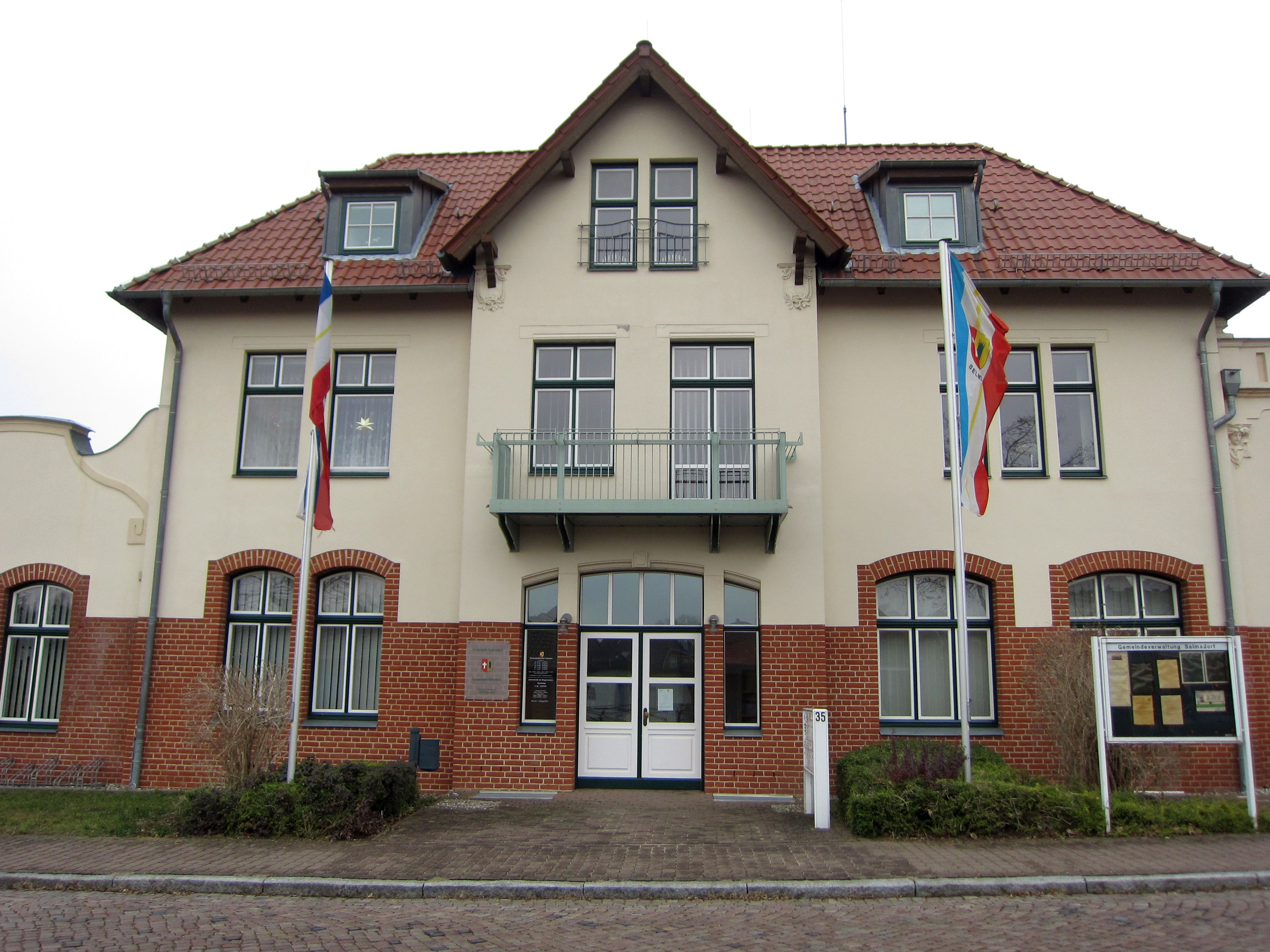 Das denkmalgeschützte Haus Lübecker Straße 35 in Selmsdorf (Gemeindeamt und Freiwillige Feuerwehr)